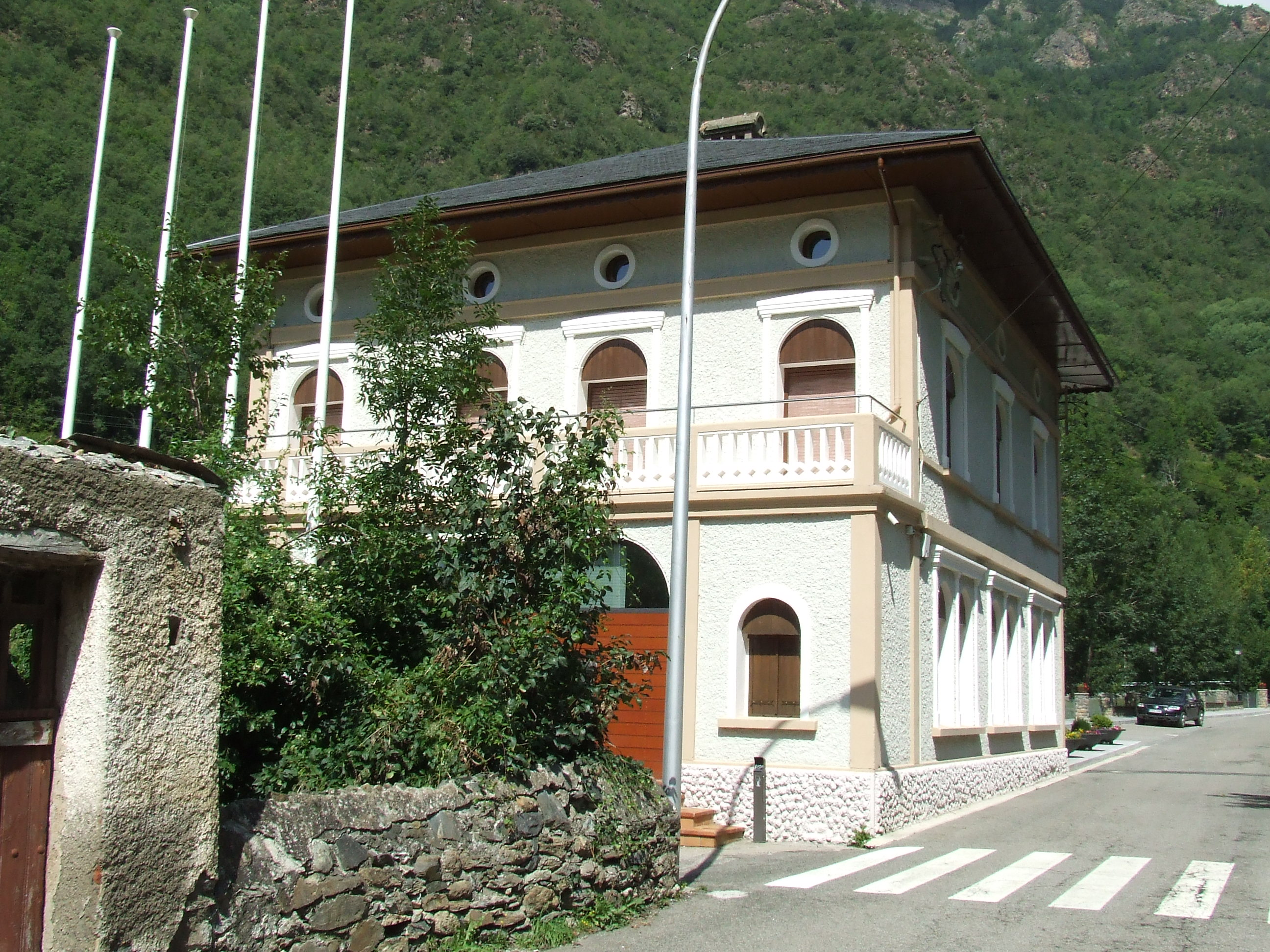 La casa de la vila de la Torre de Cabdella (Pallars Jussà)